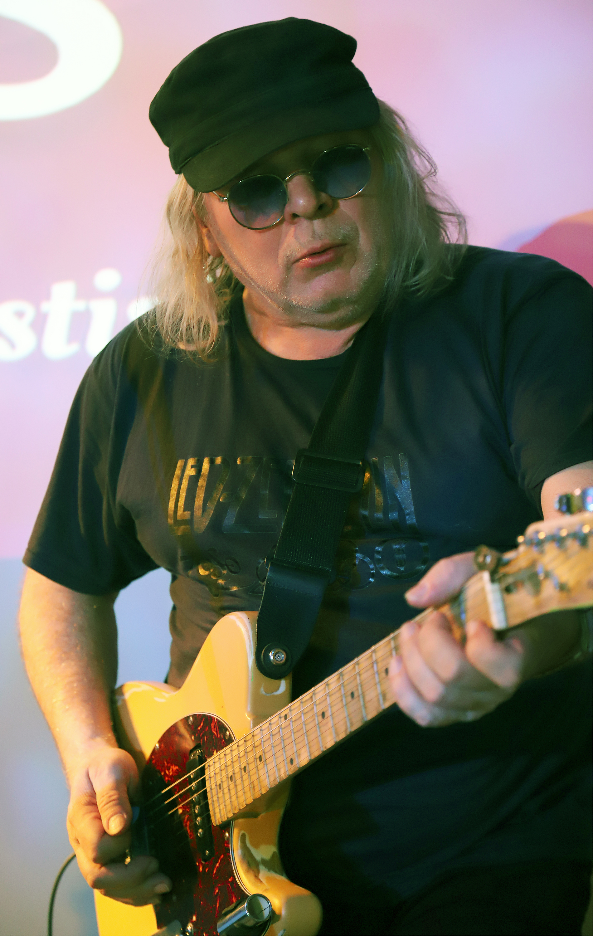 Viktor Vassiljev, Eesti kitarrist 2020